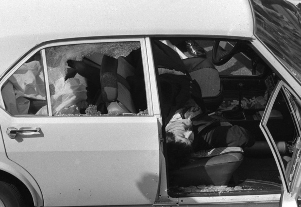 Il corpo dell'agente Giulio Rivera all'interno dell'Alfetta della scorta, in via Fani Categoria:Caso Moro